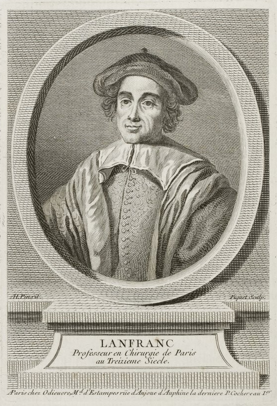 Portrait de Lanfranc de Milan.